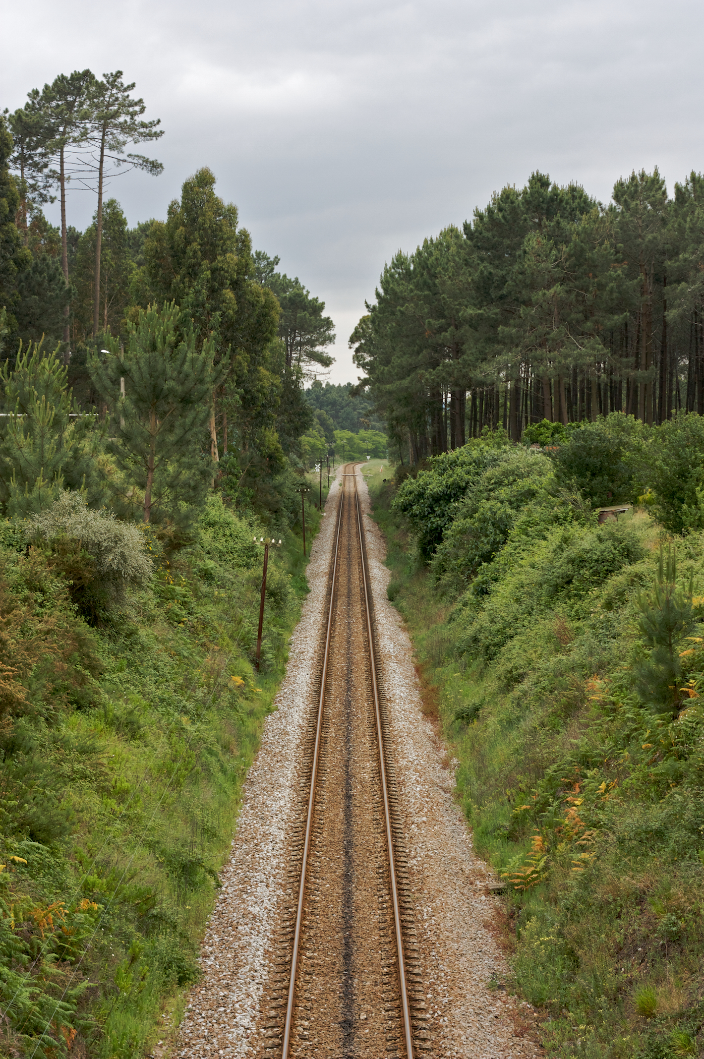 Via férrea: Linha do Oeste [PK 144] Local: Martingança Gare Data e hora: 10 de Maio de 2009 [17h19] Sentido: Cacém